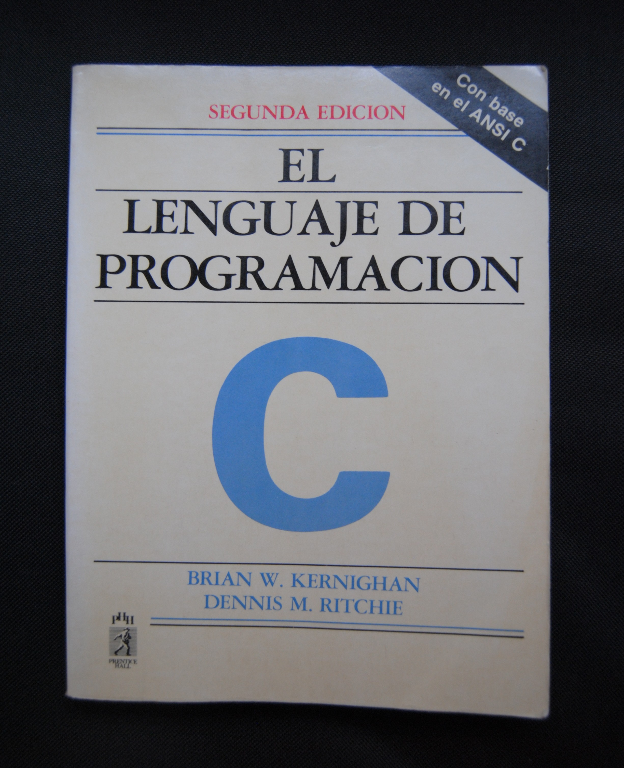 El lenguaje de programación C (segunda edición)